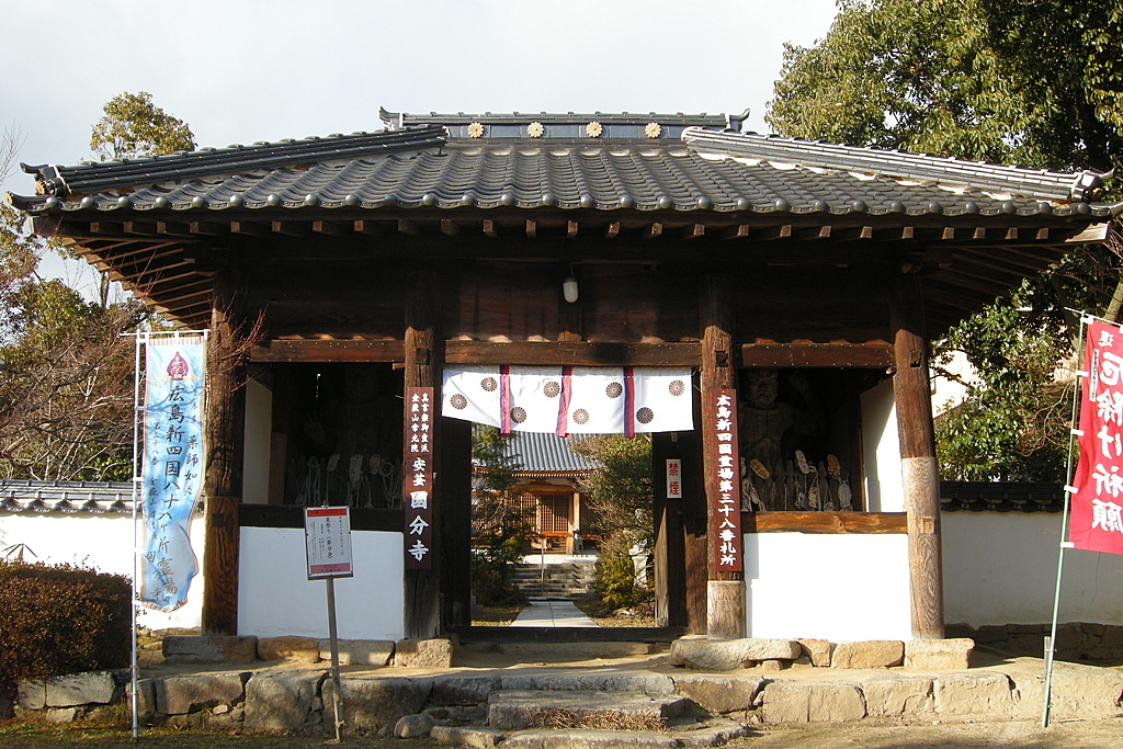 安芸国分寺 Kokubunji Temple